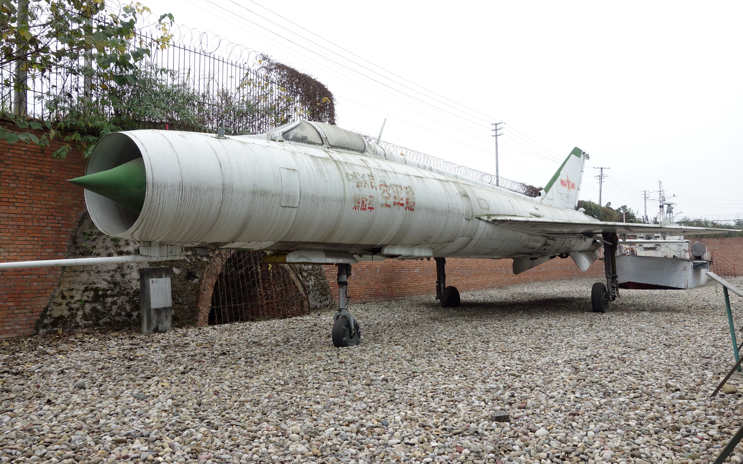 退役的歼-8I 歼击机，收藏在建川博物馆。 歼-8I 型是基于歼-8的全天候改型。